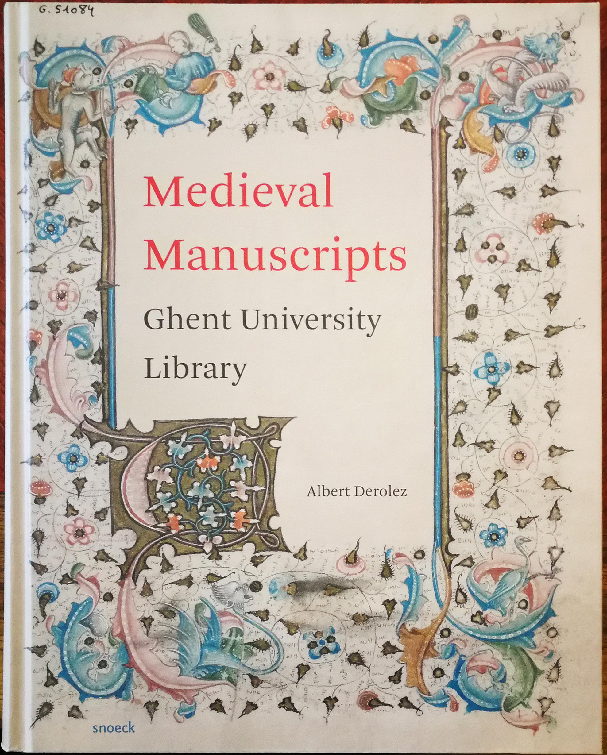 Albert Derolez (1934) Medieval Manuscripts 3-07-2019 This photo of movable heritage has been taken in the Flemish Region